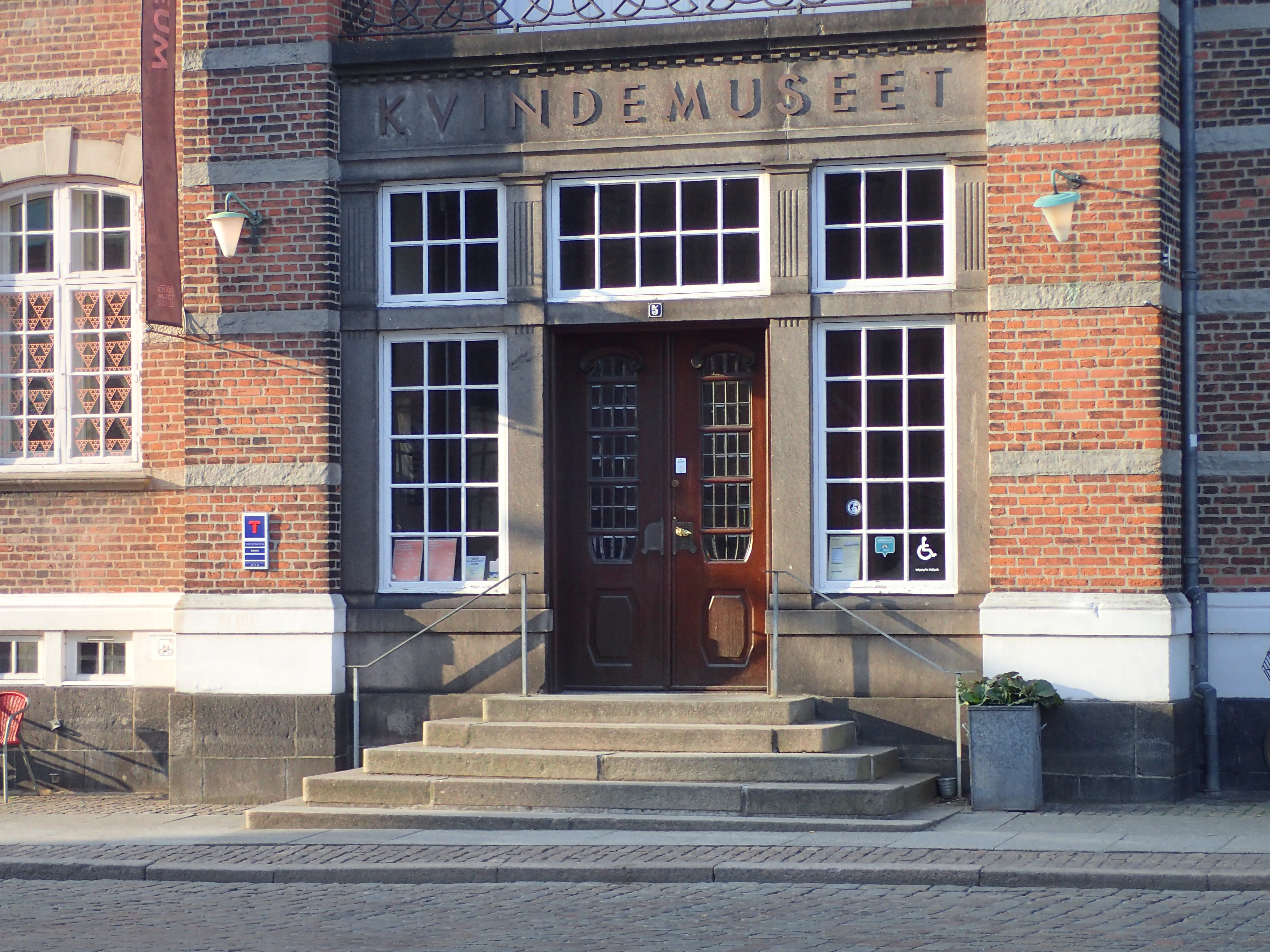 Kvindemuseet, hovedindgang.